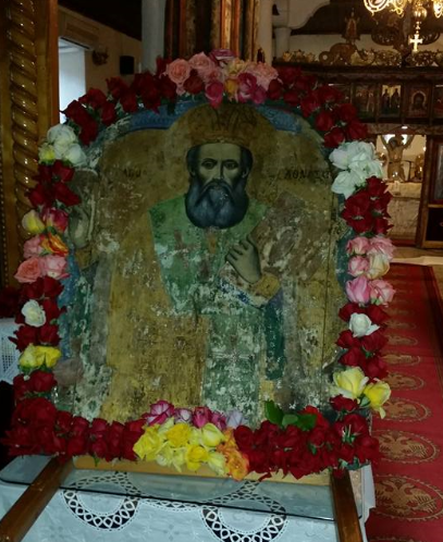 Εικόνα Πολιούχου,, Άγιος Αθανάσιος Κάρπη Κιλκίς